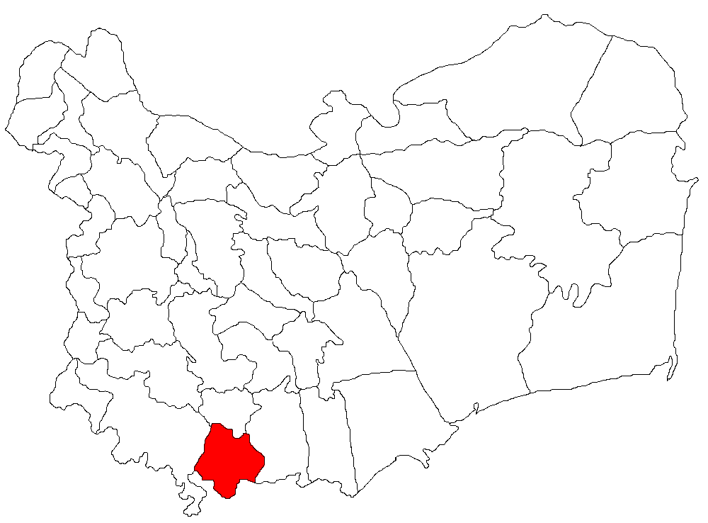 Categorie:Hărţi ale judeţului Tulcea